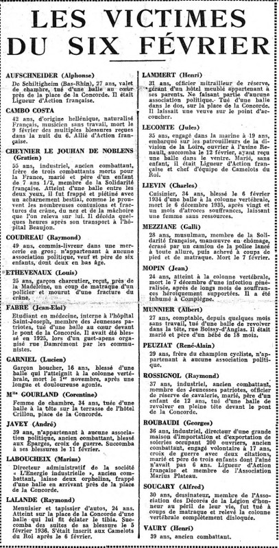 liste des victimes du 6 février 1934